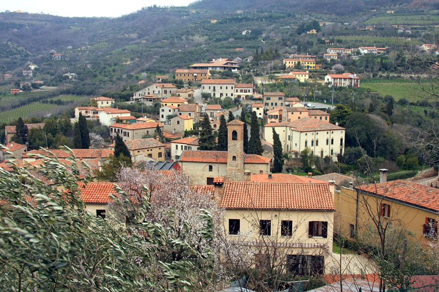 Panorama della zona alta dell'abitato di Arquà Petrarca da Monte Castello